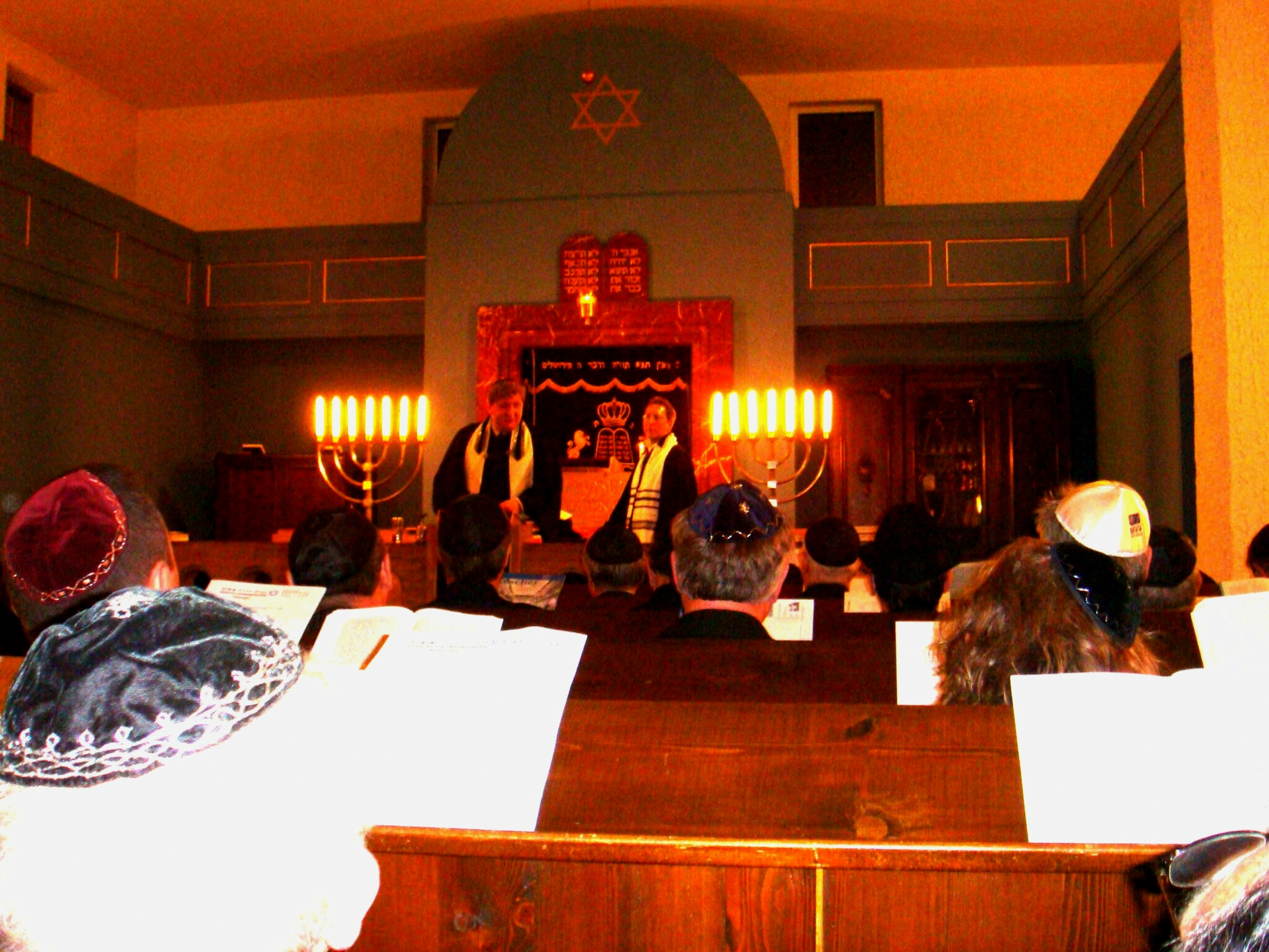 Einweihung des Rabbiners Konstantin Pal in der Neuen Synagoge von Erfurt